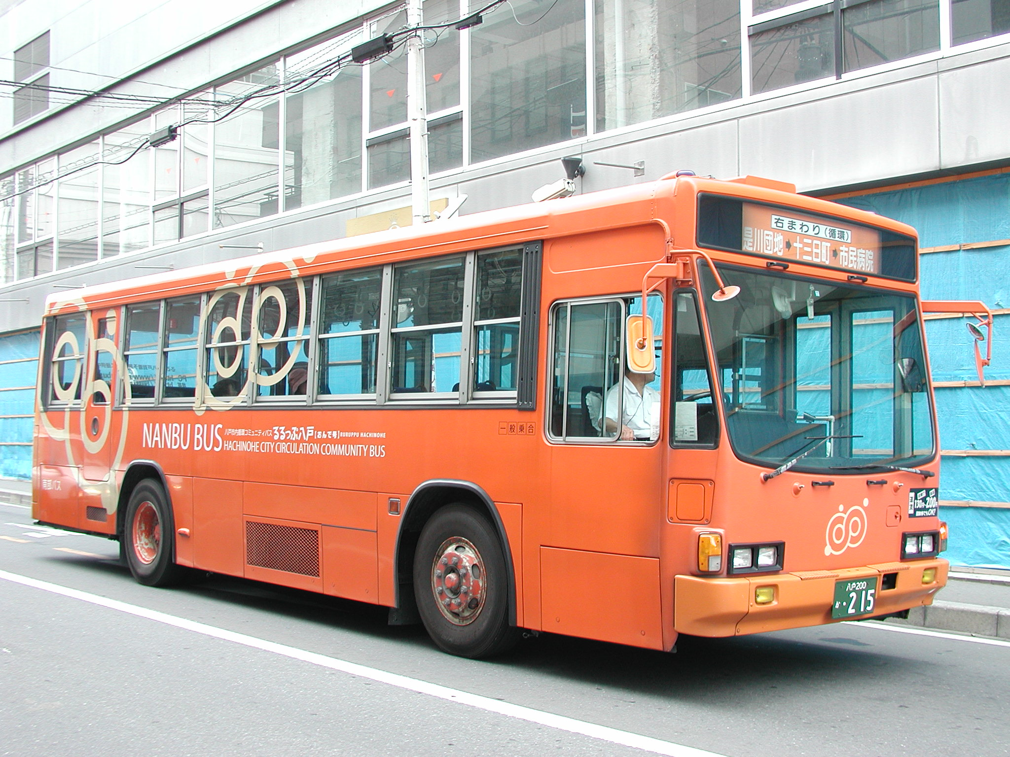 南部バス：るるっぷ八戸右まわり専用車両「おんで号」（いすゞ・キュービック・U-LV324K/元：東京都交通局）八日町（中央通り）バス停近くにて